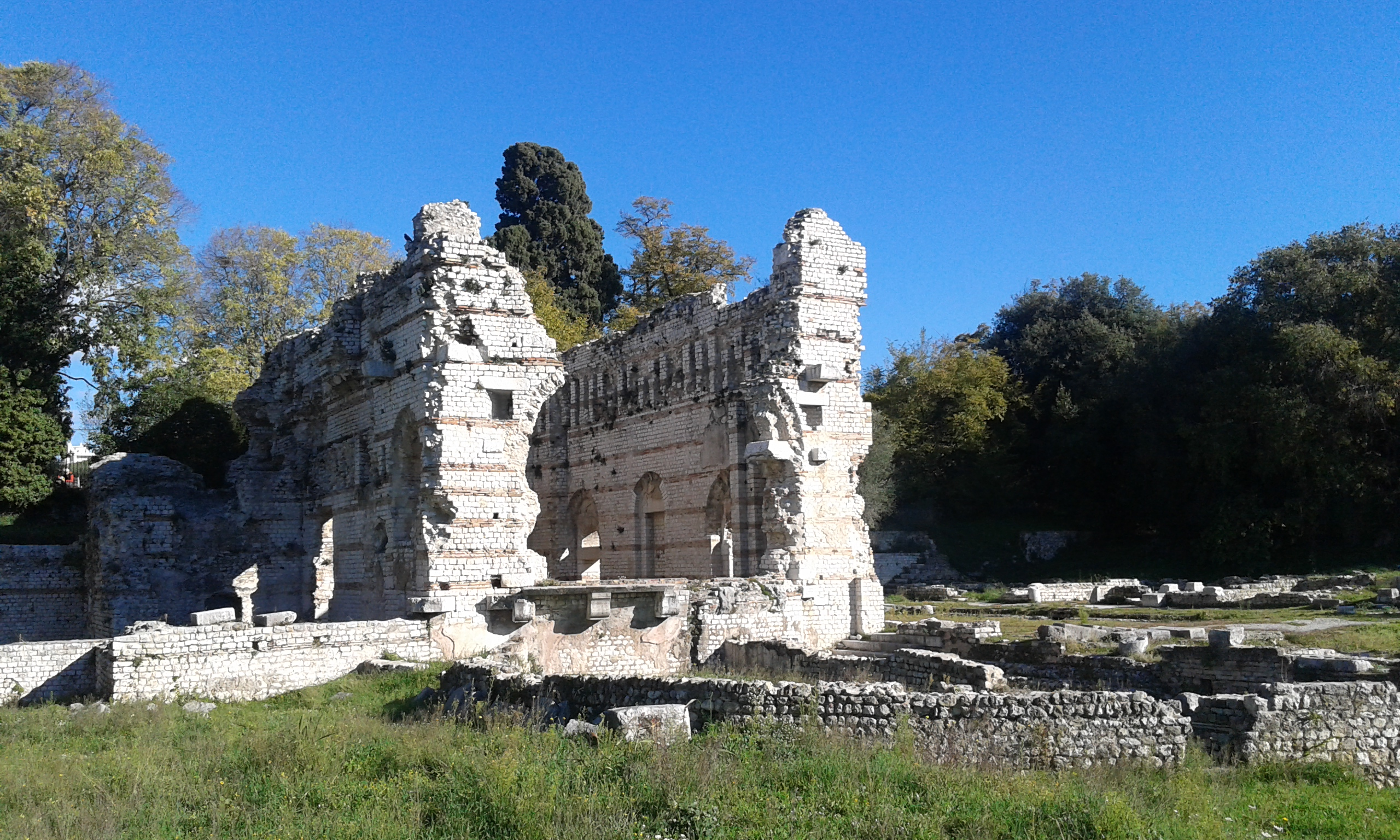 Frigidarium des thermes du nord. Thermes de Cimiez (Nice, Alpes-Maritimes, France) .